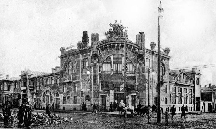 Здание Театра-цирка «Олимп». Фото начала XX века